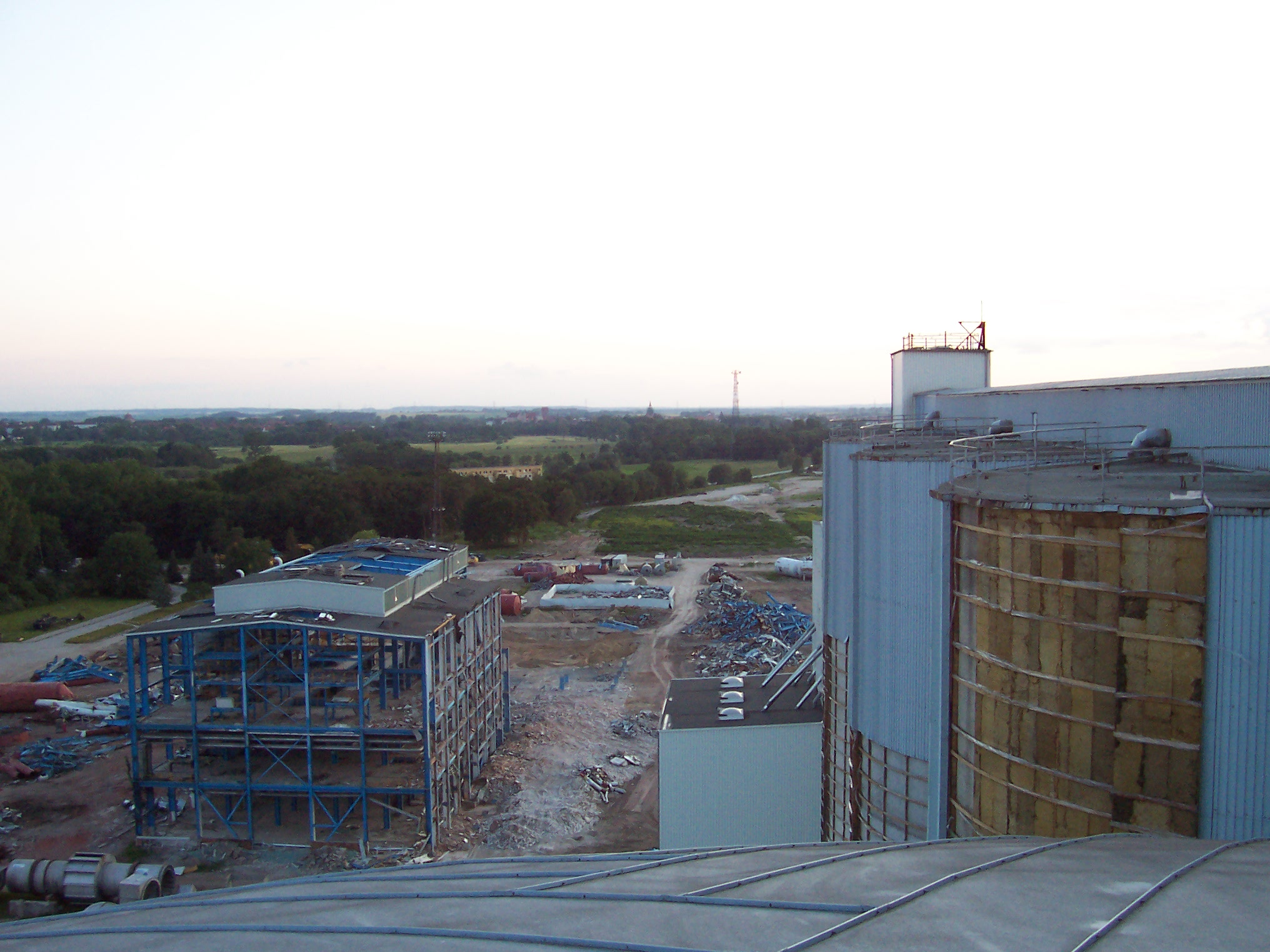 Blick auf das Gelände der Zuckerfabrick während der Abrissarbeiten im Jahr 2009 vom Dach eines Silos aus.